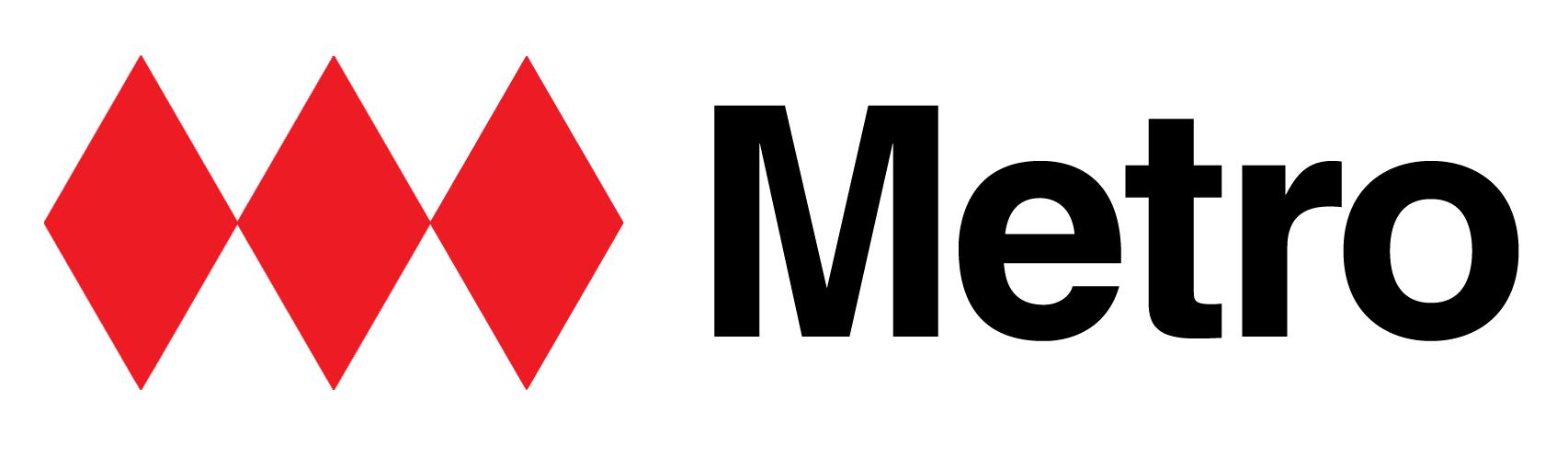 Símbolo del Metro de Santiago desde su inauguración en 1975 hasta 1997.